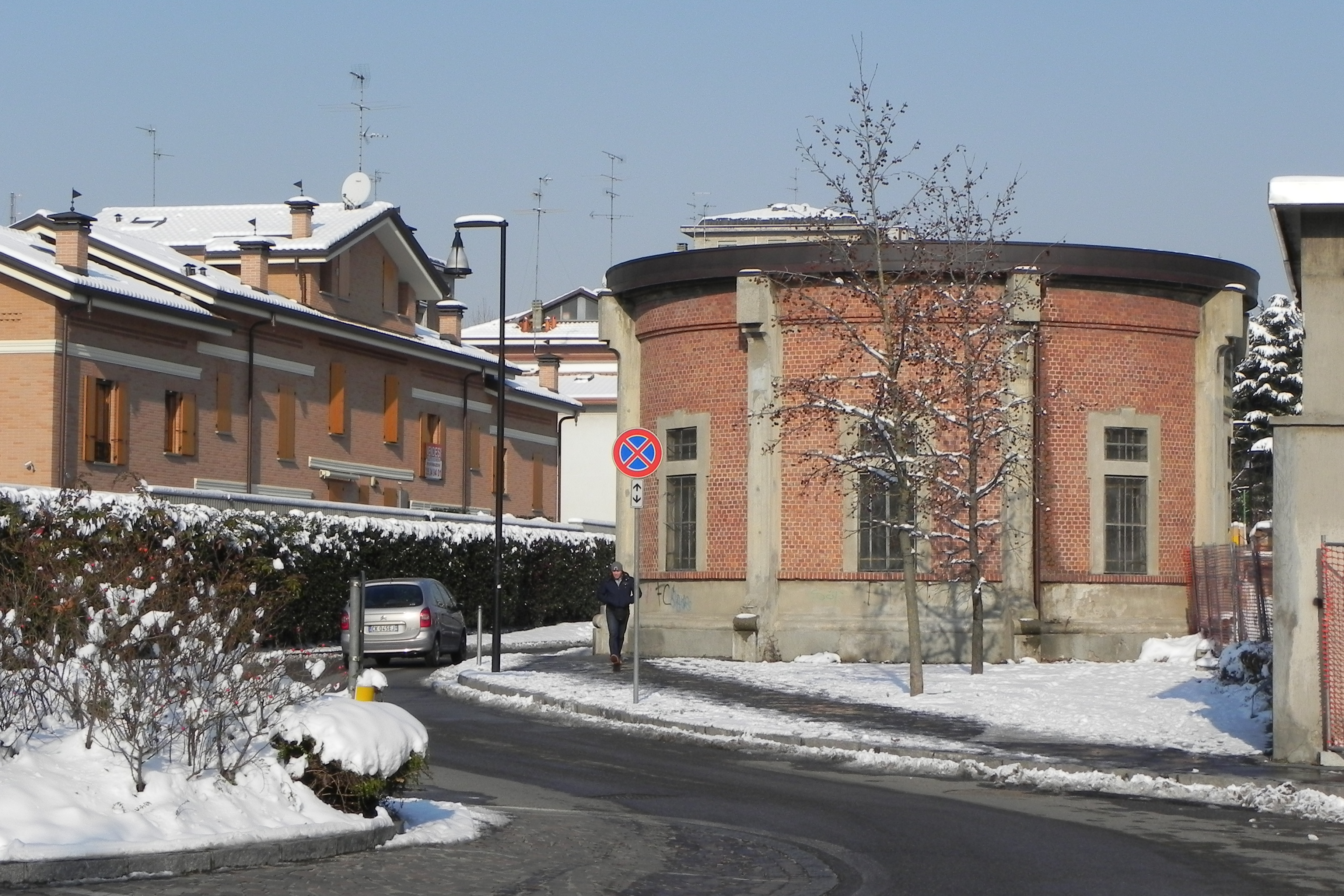 Ciò che rimane dell'acquedotto cittadino, in via XXV Aprile, a Cinisello Balsamo.